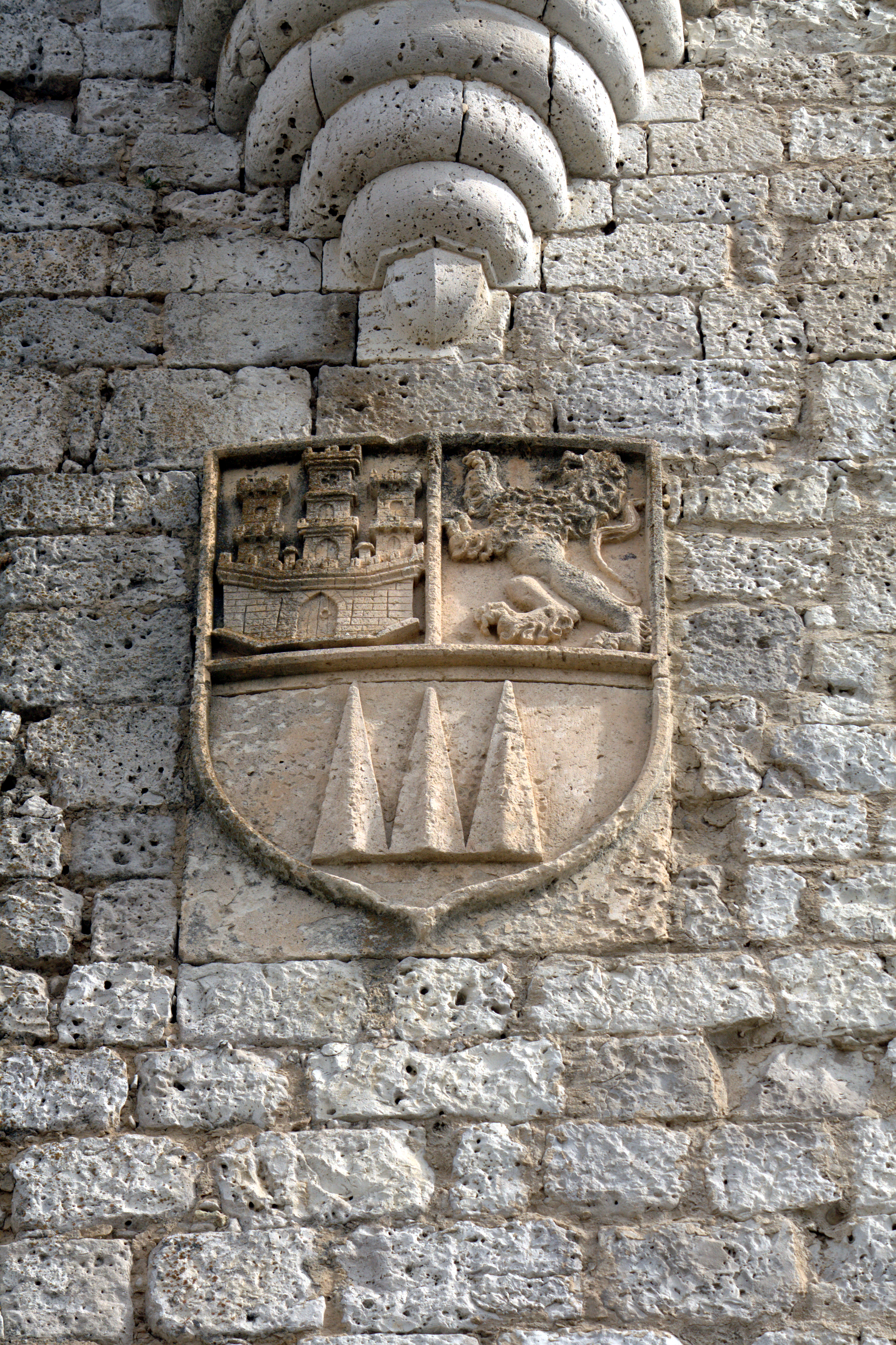 Escudo heráldico en la torre del homenaje del Castillo de Peñafiel.